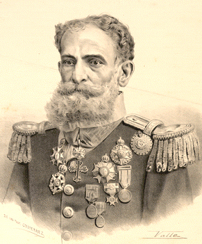 Generalíssimo Manuel Deodoro da Fonseca, Valle, [18?]. Fundação Biblioteca Nacional. Divisão de Iconografia.